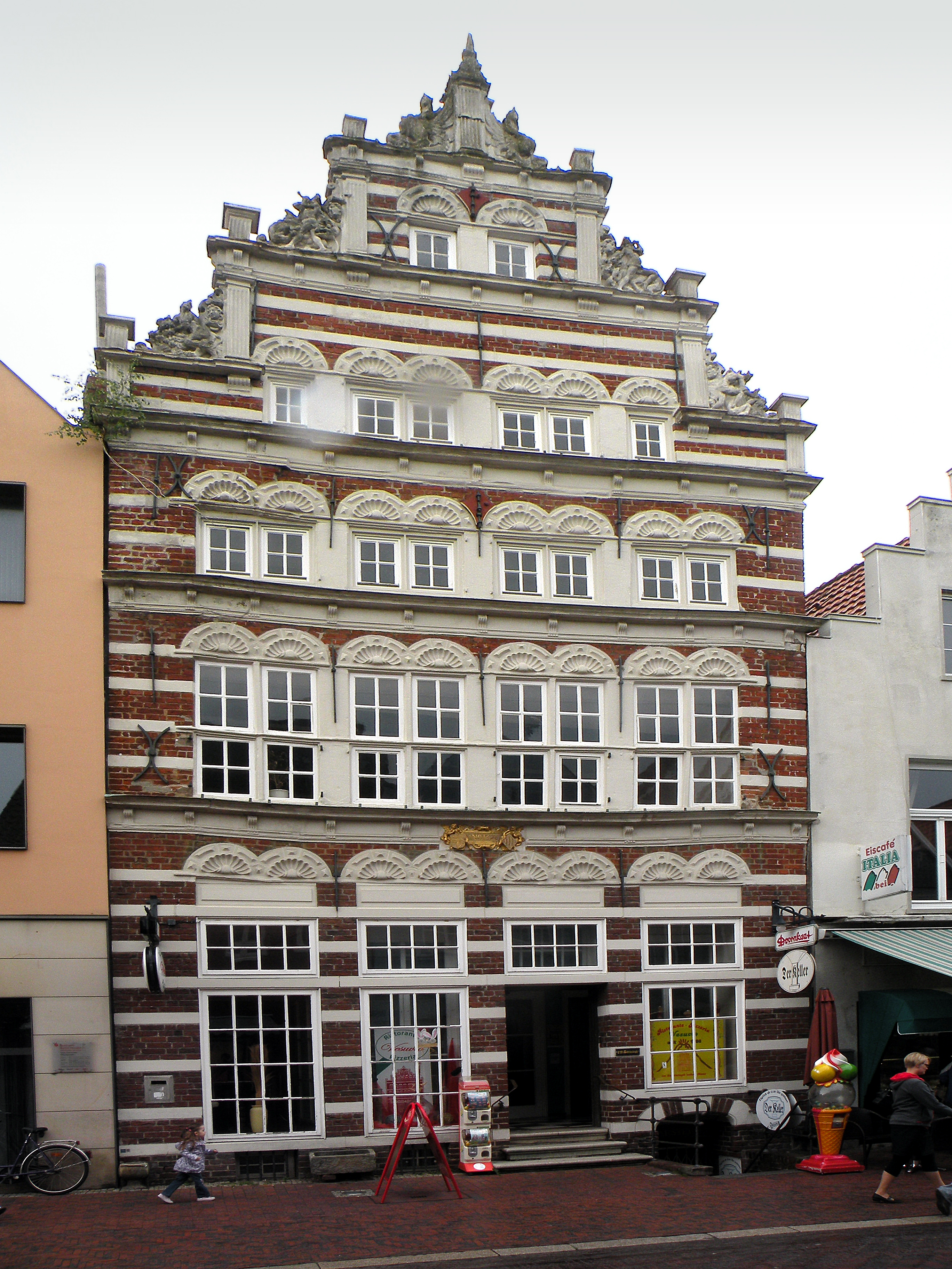 Das Schöninghsche Haus in Norden (Ostfriesland).